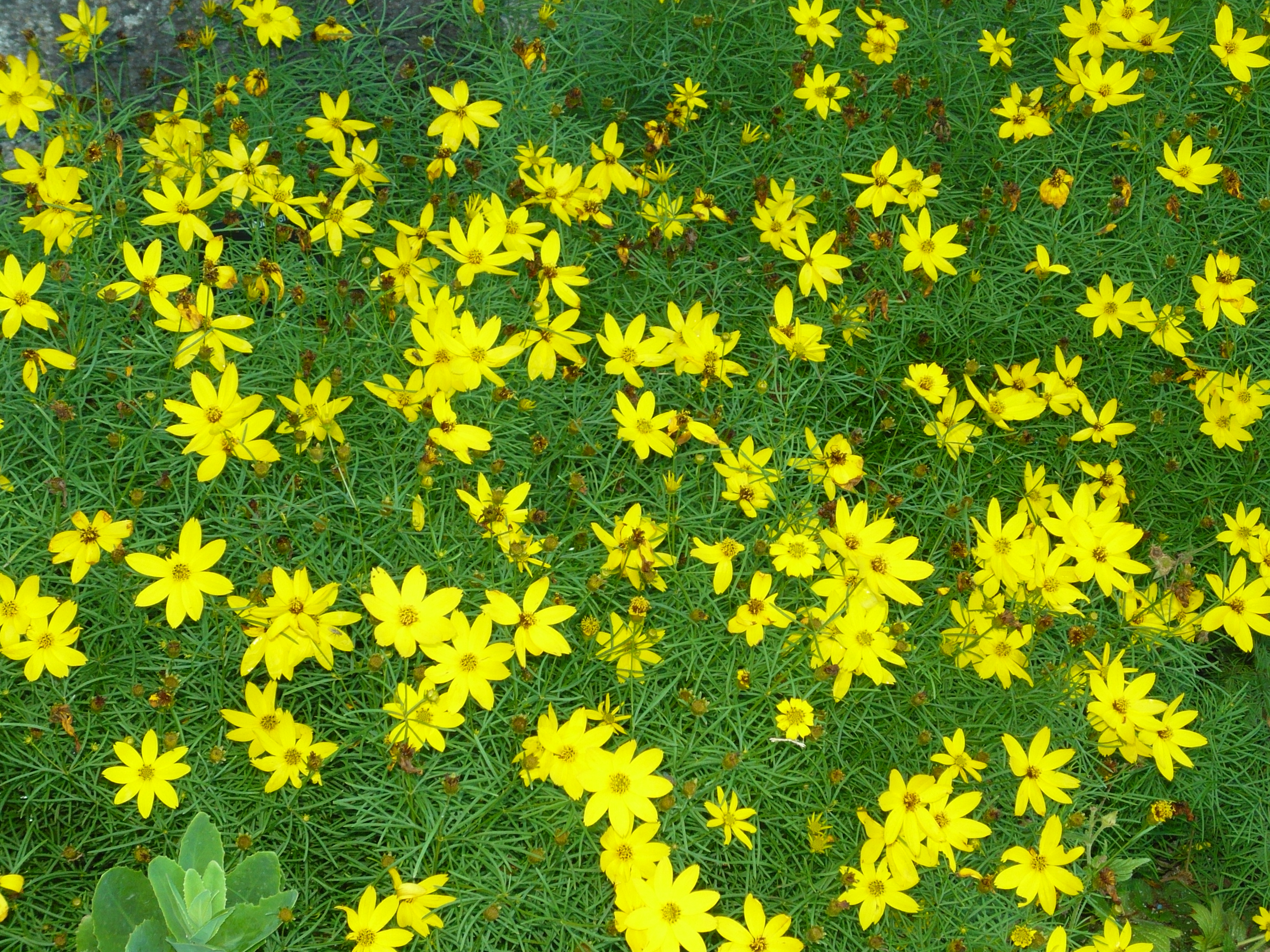 Coreopsis verticillata. Real Jardín Botánico de Madrid.